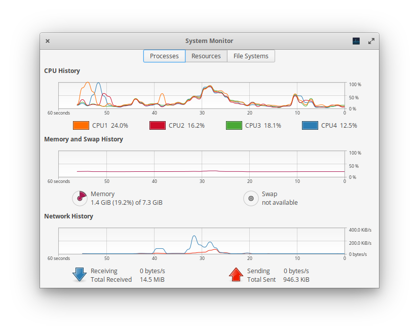 elementary OS上で動作するGNOME System Monitor。